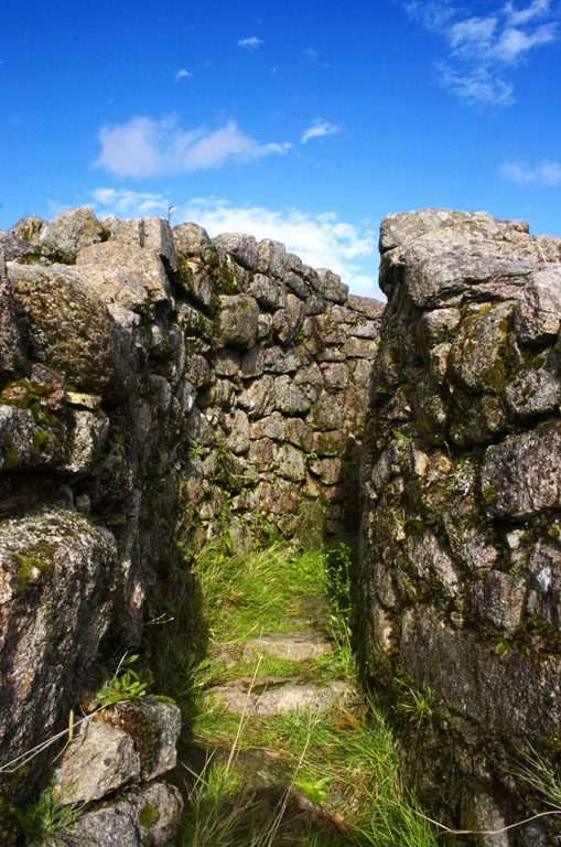 Detalle do Castro de Troña, na parroquia de Pías, Ponteareas.